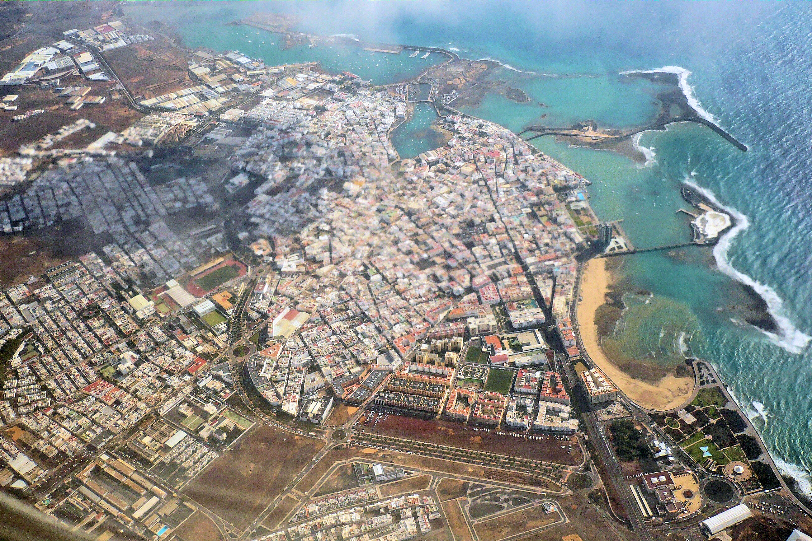 Luftaufnahme von Arrecife, Hauptstadt der Kanareninsel Lanzarote